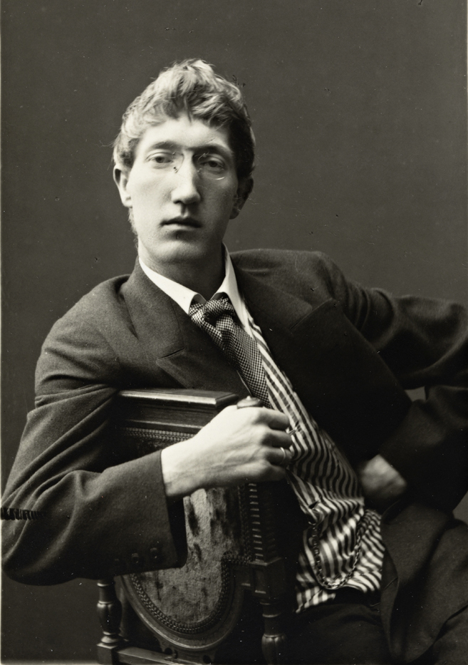 Tittel / Title: Portrett av Olav Aukrust (1883-1929) Motiv / Motif: Olav Aukrust var far til Kjell Aukrust (1920-2002). Fotografiet har tilhørt Inge Krokann (1893-1962) Dato / Date: ukjent / unknown Fotograf / Photographer: L. Forbechs eftf. (Kristiania) Sted / Place: Oslo Eier / Owner Institution: Nasjonalbiblioteket / National Library of Norway Lenke / Link: Bildesignatur / Image Number: blds_04866